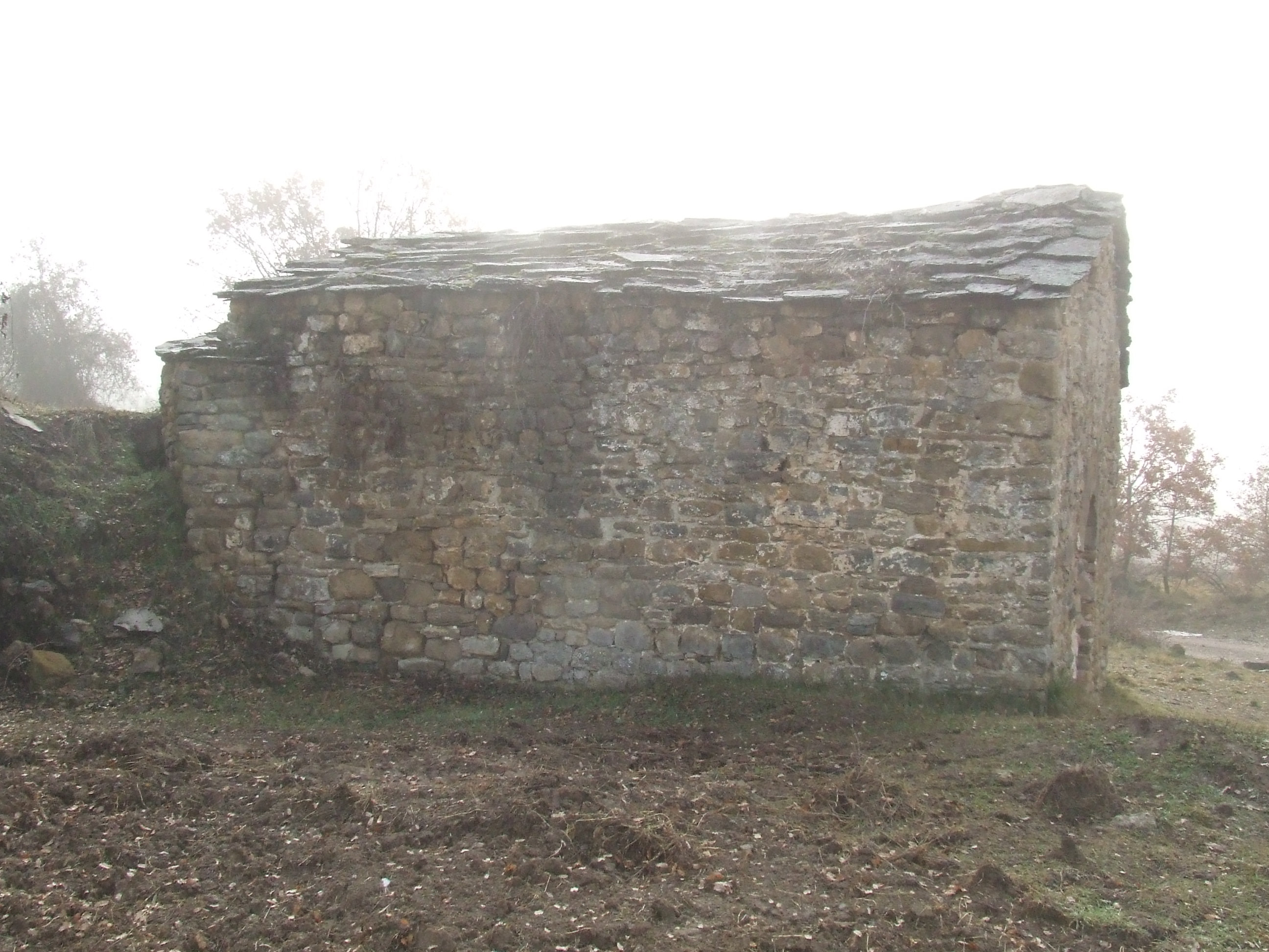 Façana sud de Sant Fruitós d'Aransís (Gavet de la Conca, Pallars Jussà)